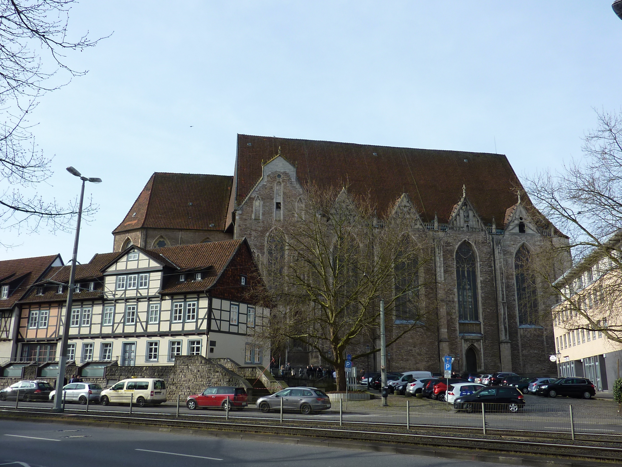 St. Aegidien (Braunschweig)